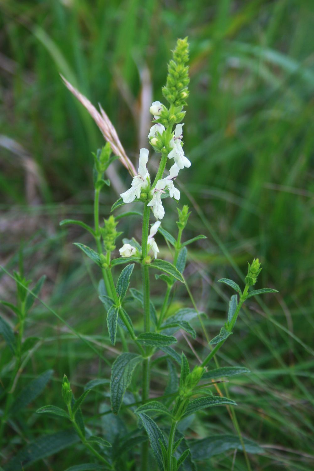 Aufrechter Ziest (Stachys recta subsp. recta), Lippenblütler (Lamiaceae) - Slowenien/Slovenija/Slovenia: Primorska, "Prärie" NNW Praproče